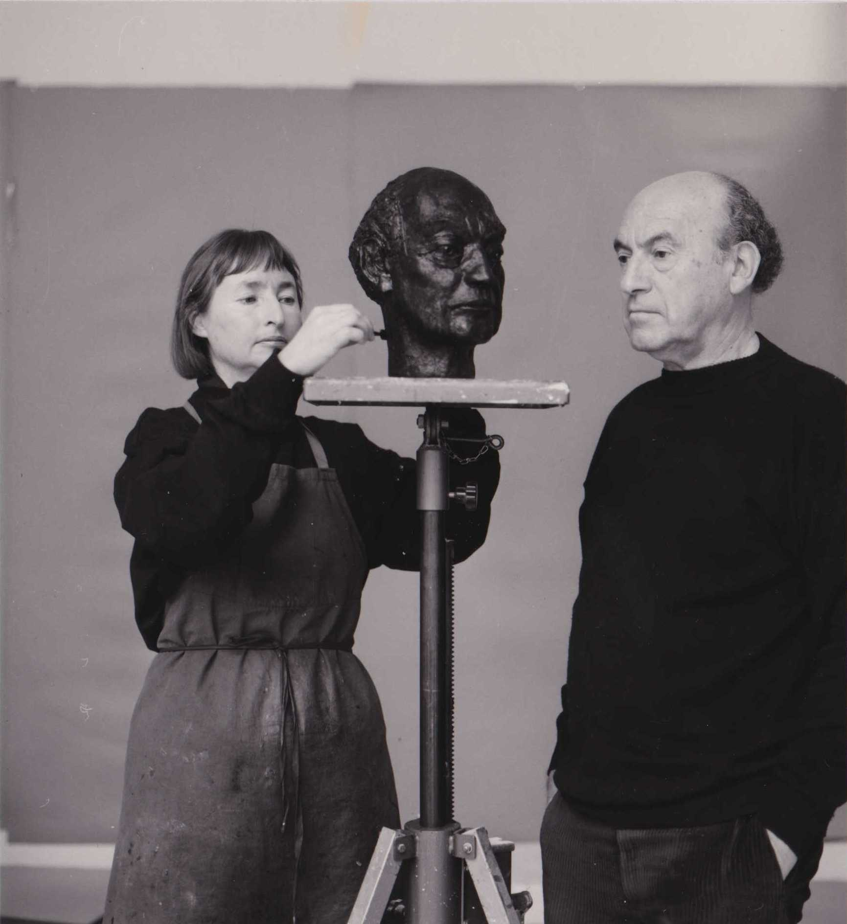 Ursula Stock im Atelier beim Porträtieren ihres Mannes, des Architekten Heinz Rall, 1990.